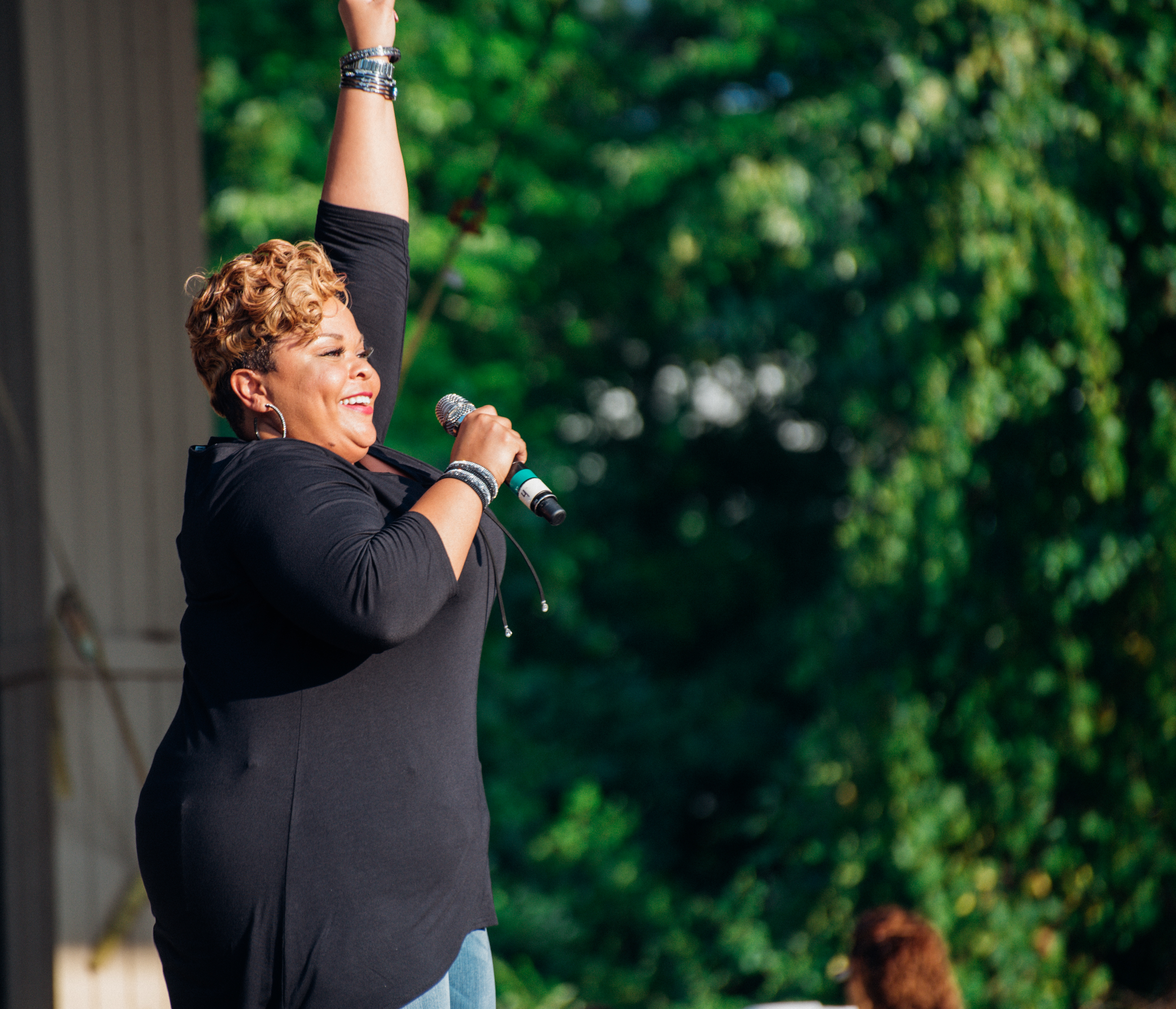 Tamela Mann